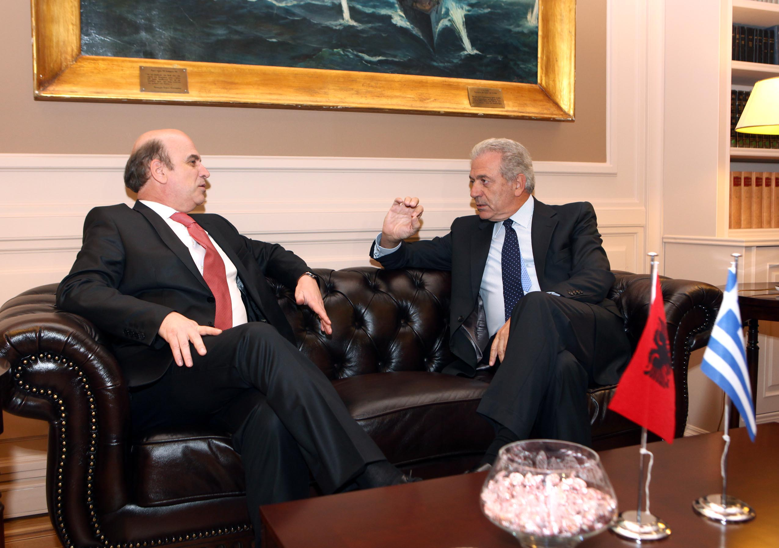 Την Τετάρτη 3 Οκτωβρίου 2012, ο Υπουργός Εξωτερικών Δημήτρης Αβραμόπουλος συναντήθηκε με τον Υπουργό Εξωτερικών της Αλβανίας Edmond Panariti. Πηγή:Στόλης